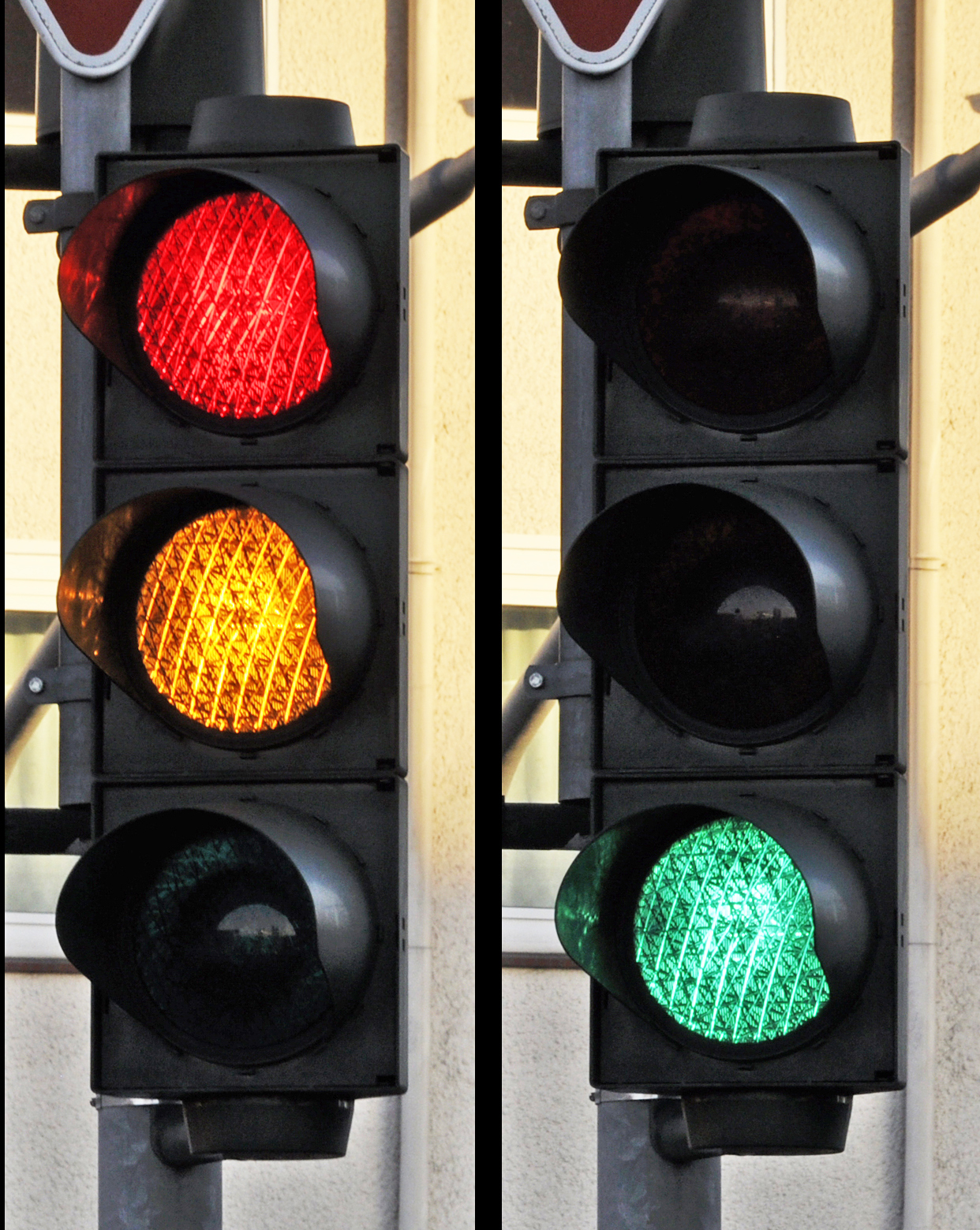 Autoampel, Göttingen, Weender Landstraße/Galluspark-Parkplatz, 30.12.2013.